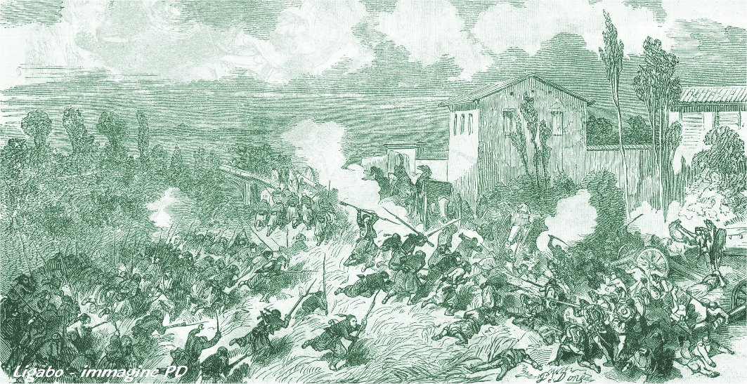 Battaglia di Palestro. 31 maggio 1859. Il 3º reggimento Zuavi assalta alla baionetta l'artiglieria austriaca, nei pressi del ponte della Brida.